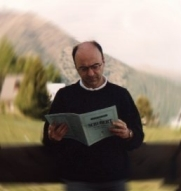 Domenico Innominato a Teglio di Valtellina, estate 2004